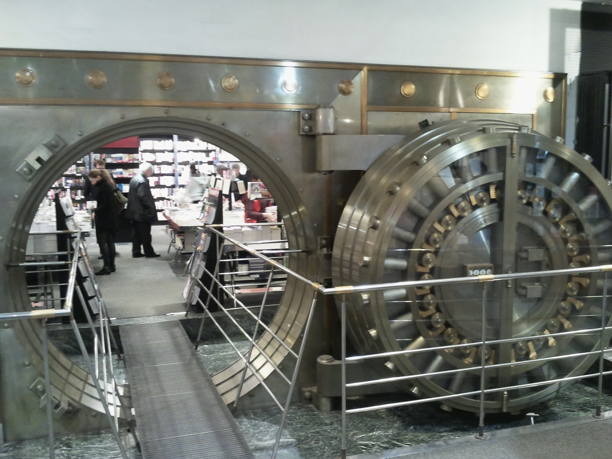 Libraire, Salle des coffres Virgin Megastore Champs-Elysées Paris